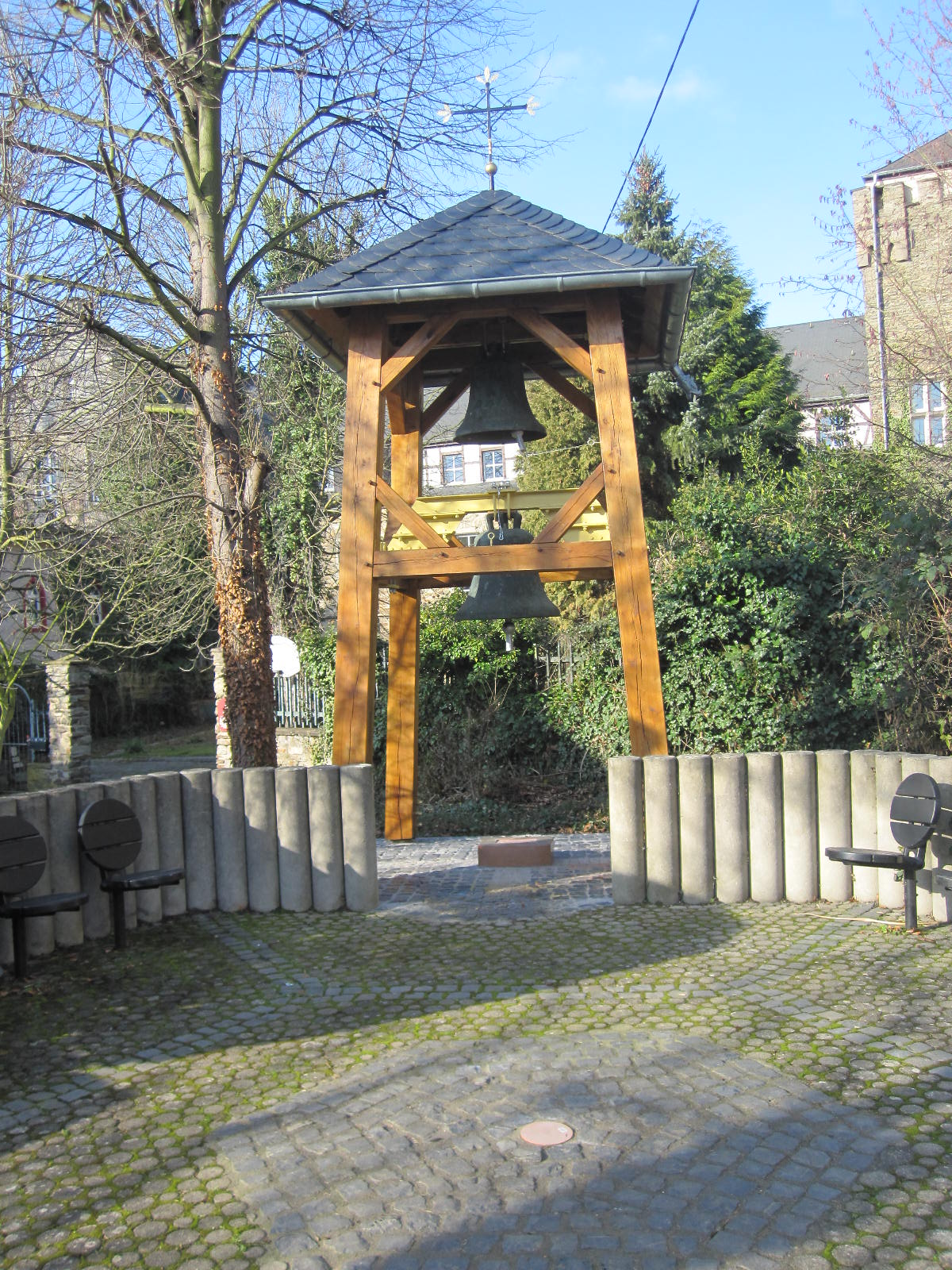 Bild neuer Glockenstuhl Ariendorf